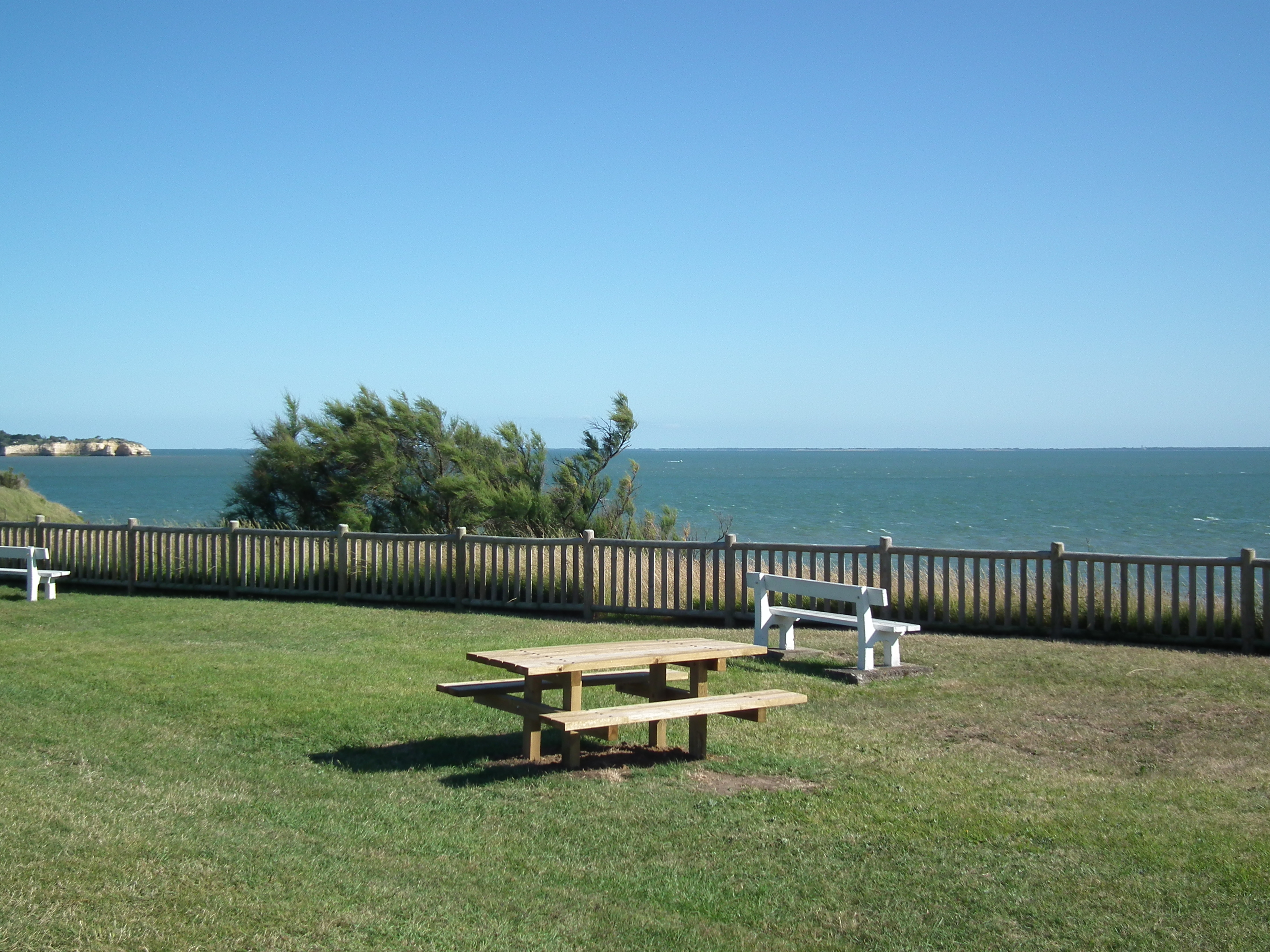 Panorama sur l'estuaire de la Gironde depuis la pointe de Vallières